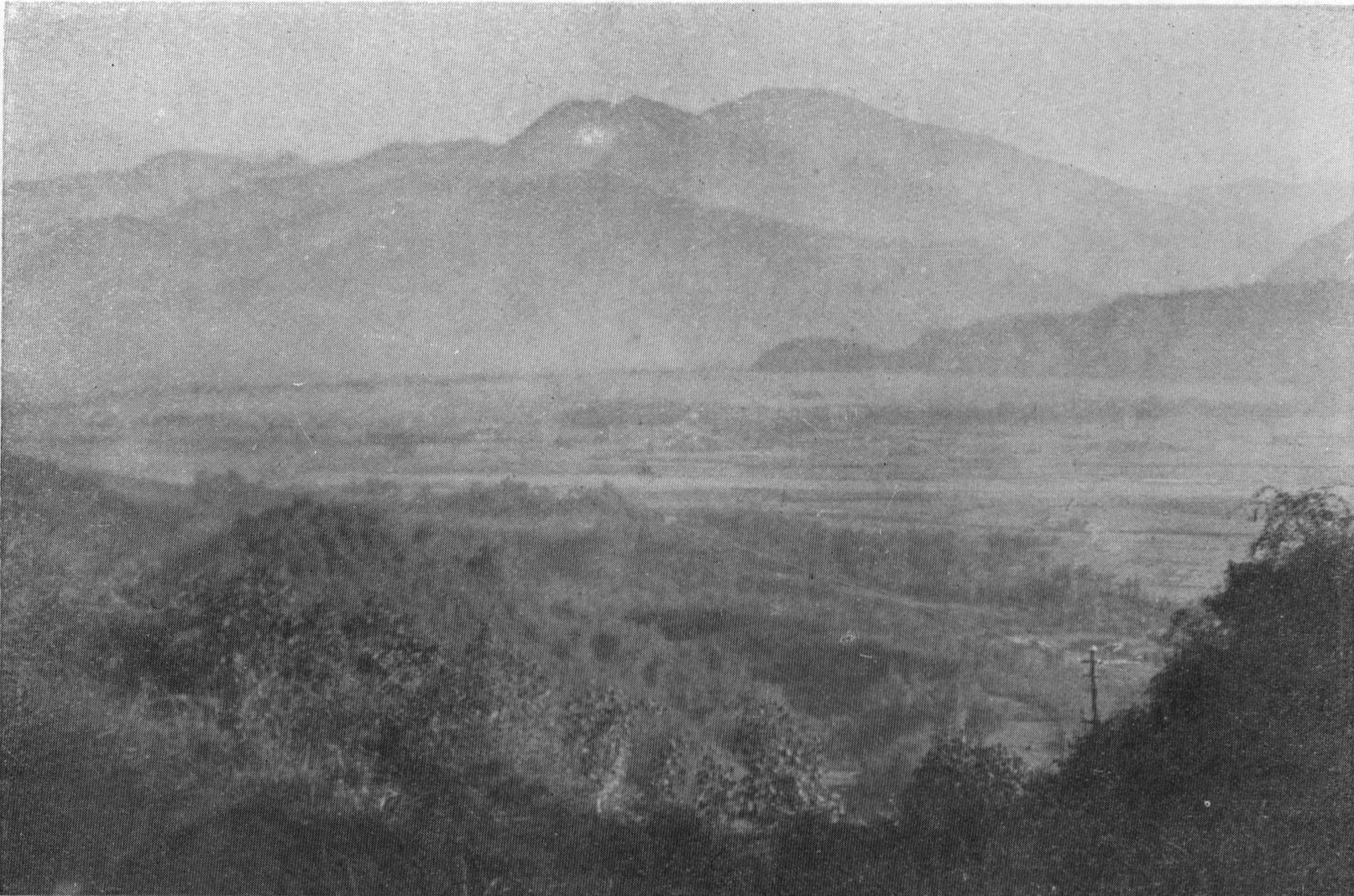 中文（台灣）: 作者：勝山吉作。埔里盆地。典藏者：中央研究院數位物件典藏者：中央研究院數位文化中心。公眾領域標章（Public Domain Mark）。發佈於《開放博物館》